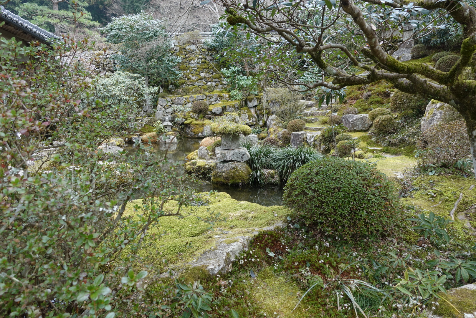 京都大原にある実光院の庭園